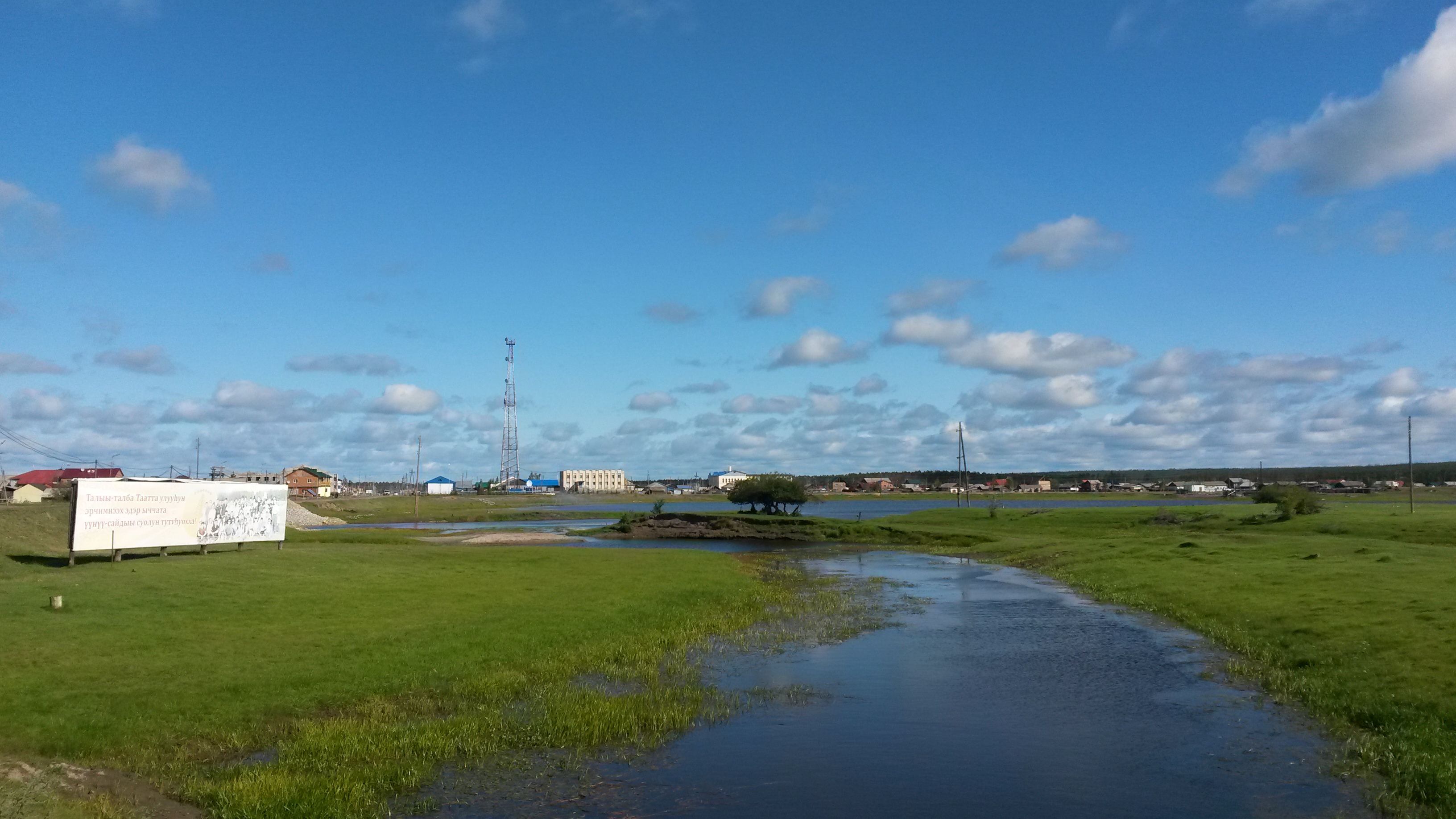 Эта фотография сделана мною в центре села Ытык-Кюель.